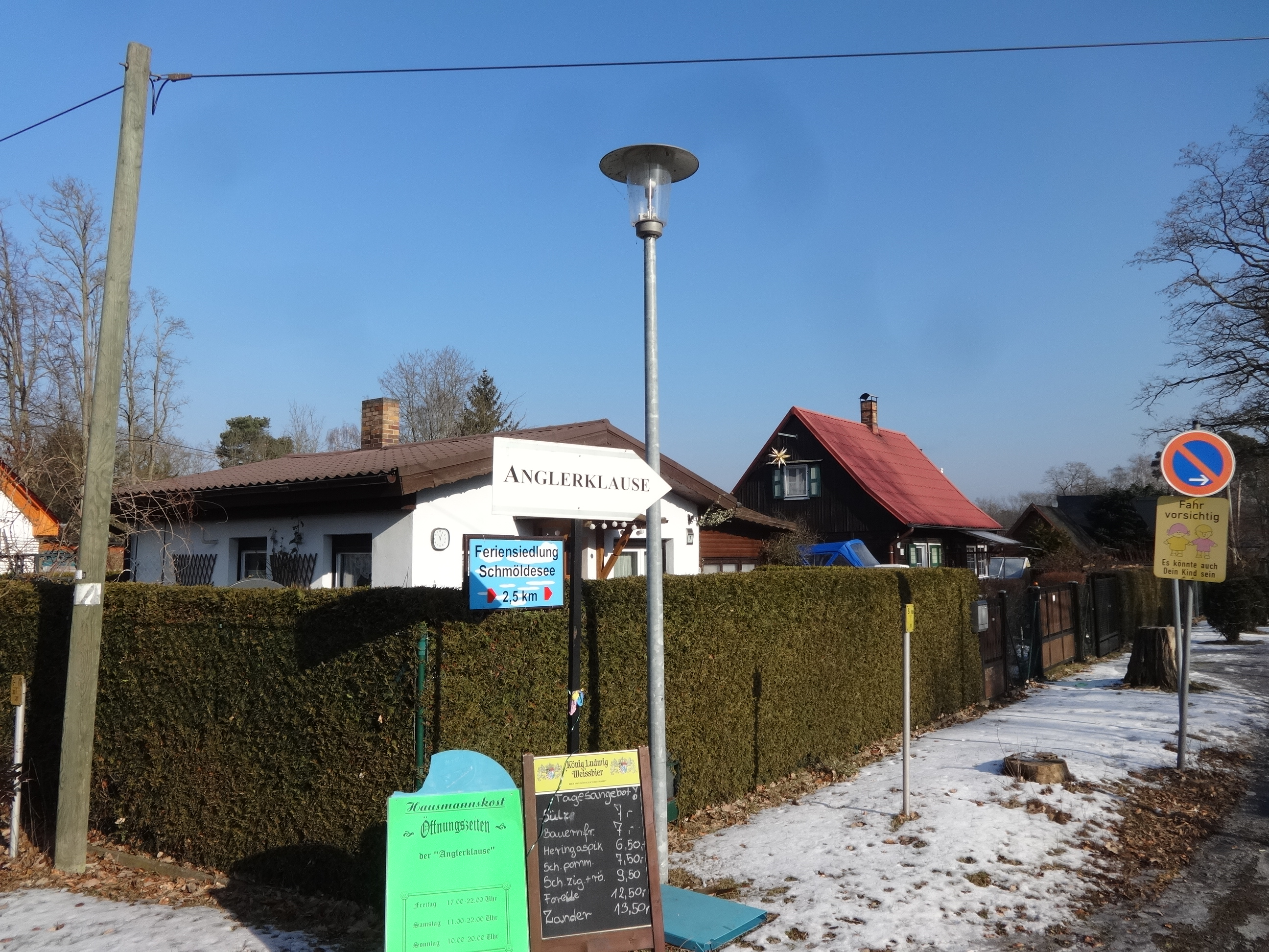 Neubrück, ein Wohnplatz der Gemeinde Groß Köris im Landkreis Dahme-Spreewald in Brandenburg